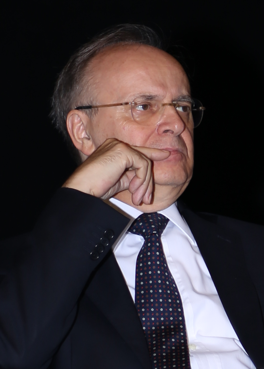 Piercamillo Davigo incontro dibattito "Partiti per la tangente", Milano, 20 ottobre 2014.